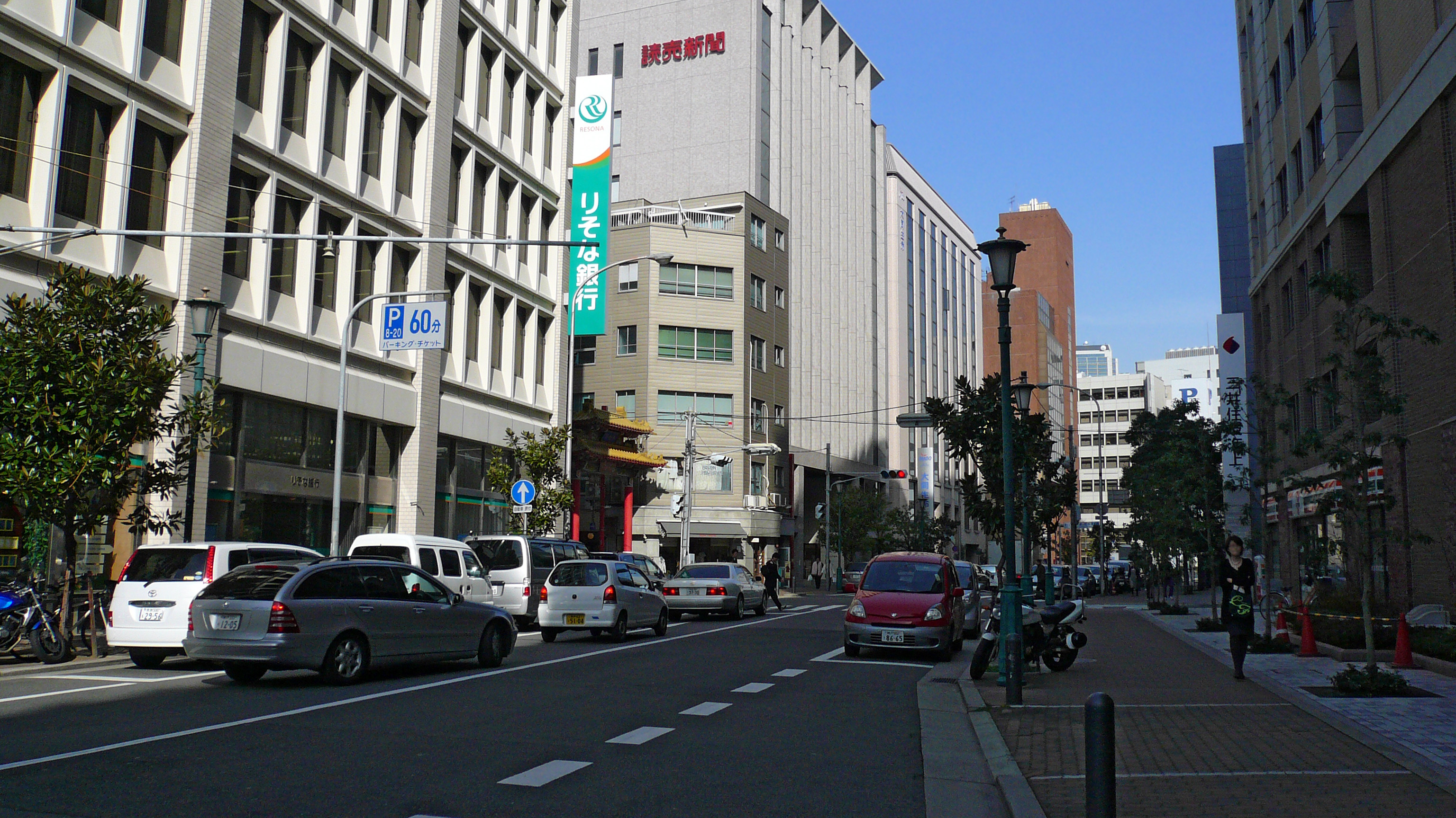 Sakaemachi street in Kobe, Hyogo, Japan